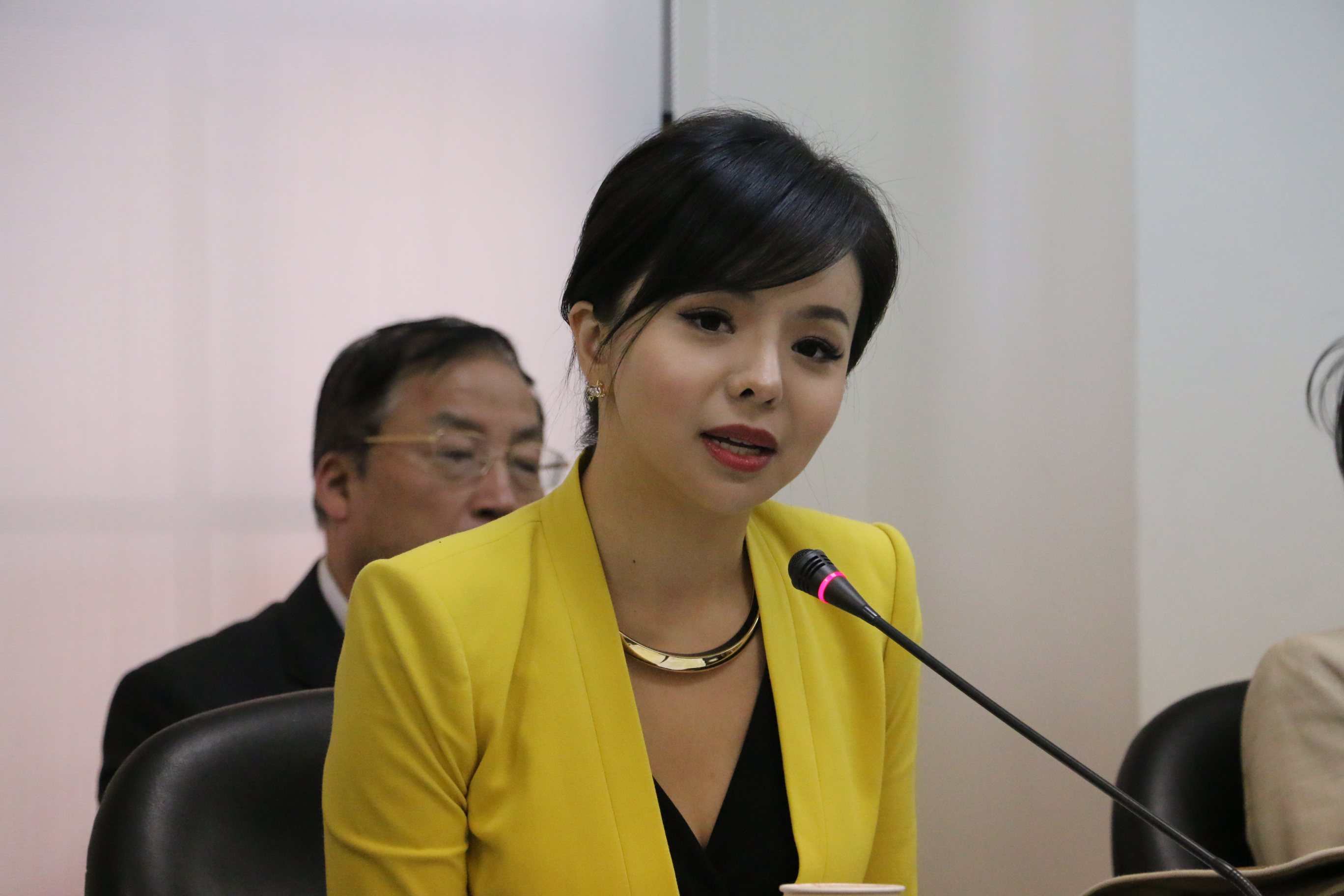 加拿大世界小姐林耶凡（美国之音杨明拍摄 ）